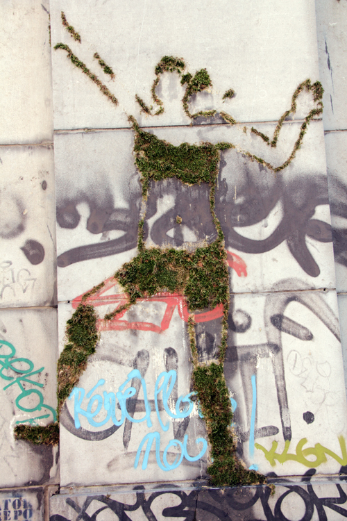 Moosgraffito in Bruessel.